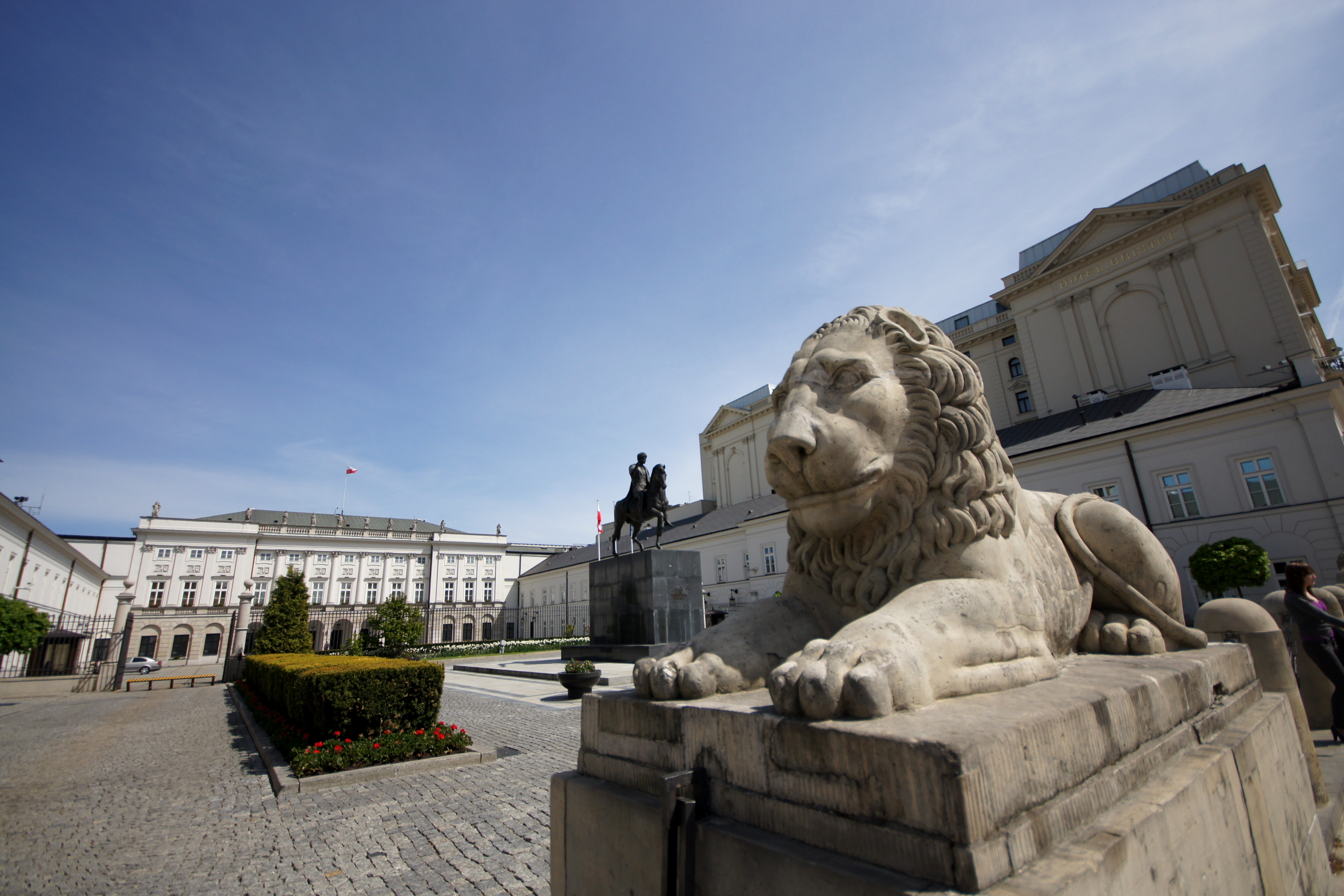 Pałac Prezydencki w Warszawie